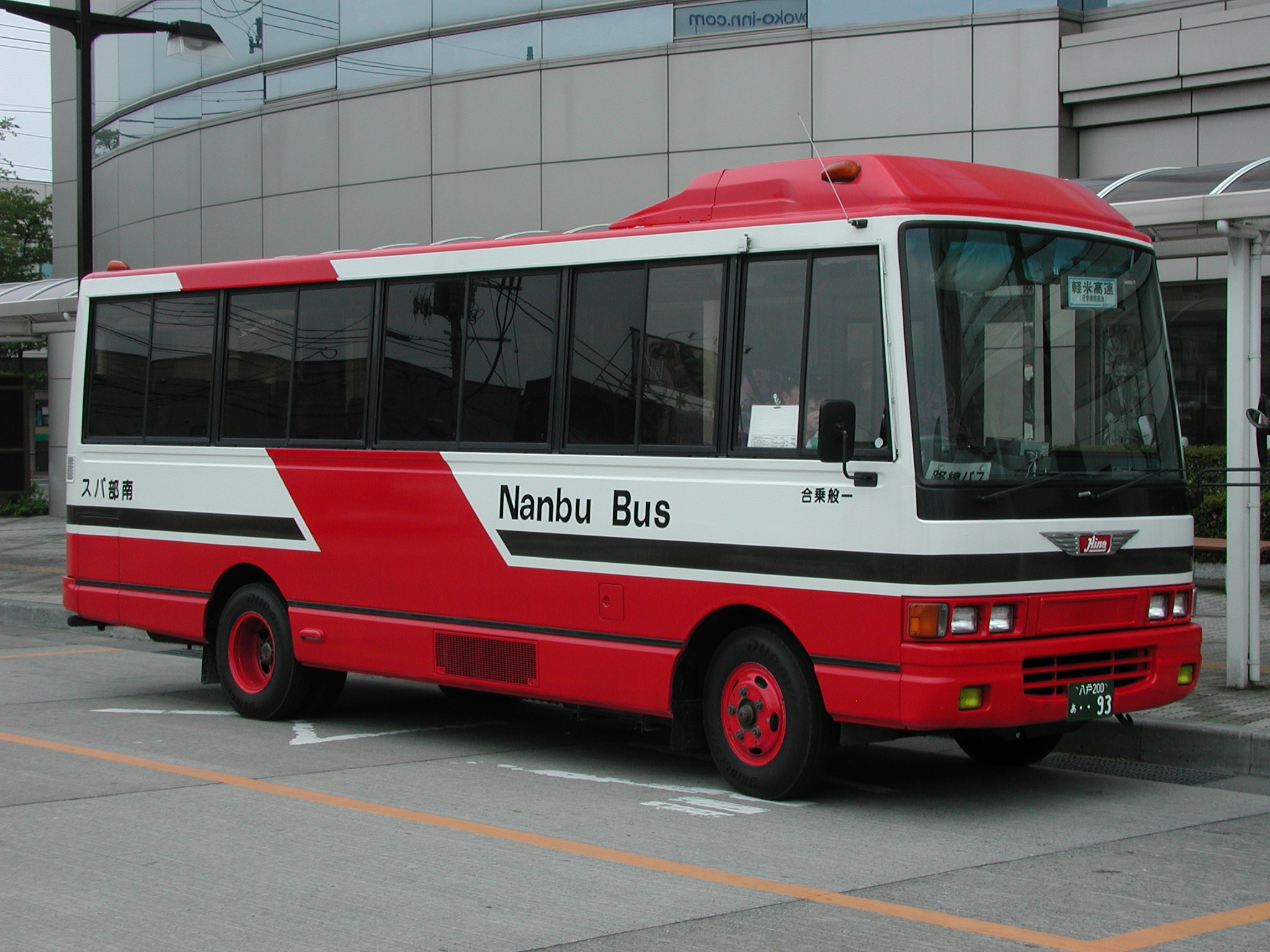 南部バス一般路線現行塗装/小型貸切車（日野・レインボーRB中扉仕様・U-RB1WGAA）：軽米高速線運用八戸駅東口にて